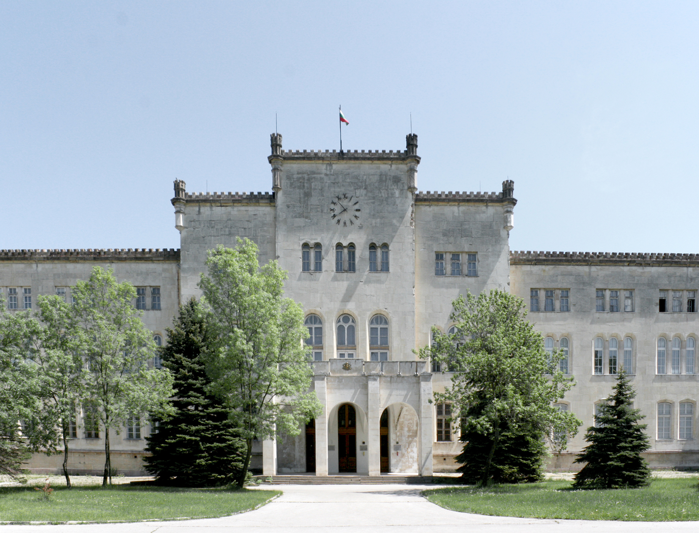 Фасада на сградата на военна академия "Г.С. Раковски"